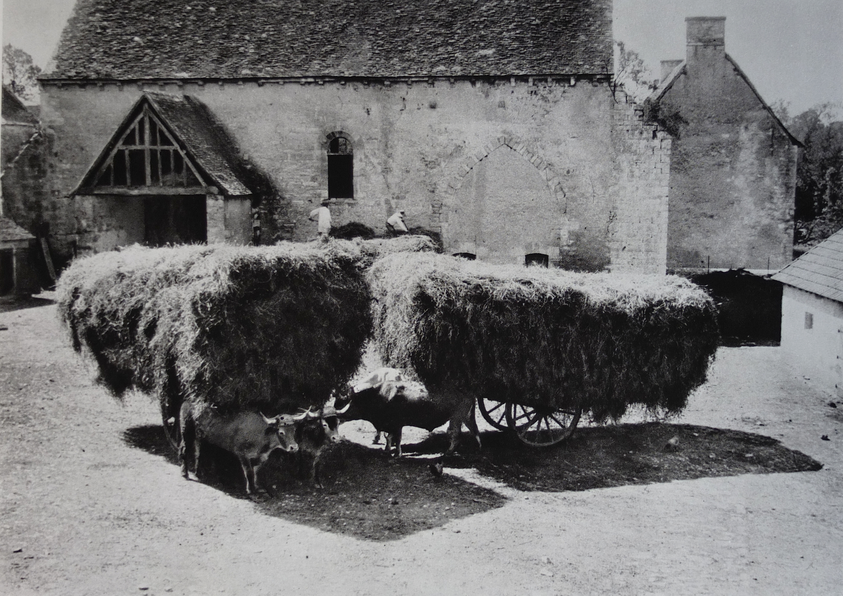 La moisson, charrois devant l'ancienne église abbatiale de Varennes, photographie de Jenny de Vasson, vers 1905. Collection particulière.